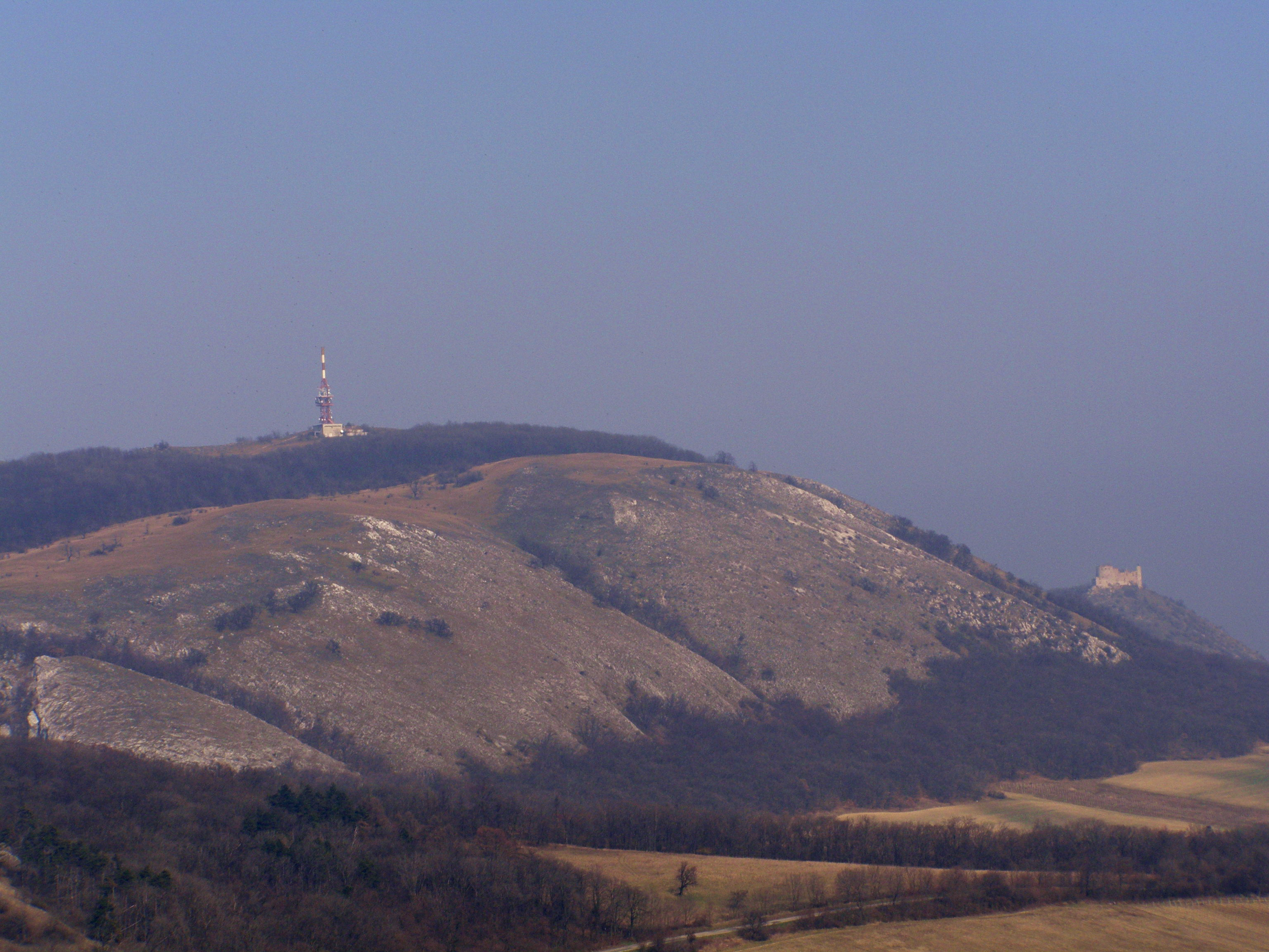 Pavlovské vrchy, zleva Děvín a Dívčí hrady, pohled ze Sirotčího hrádku